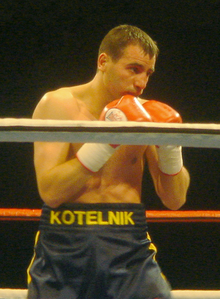 Andreas Kotelnik